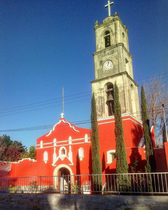 Parroquia de San Carlos, Tamaulipas